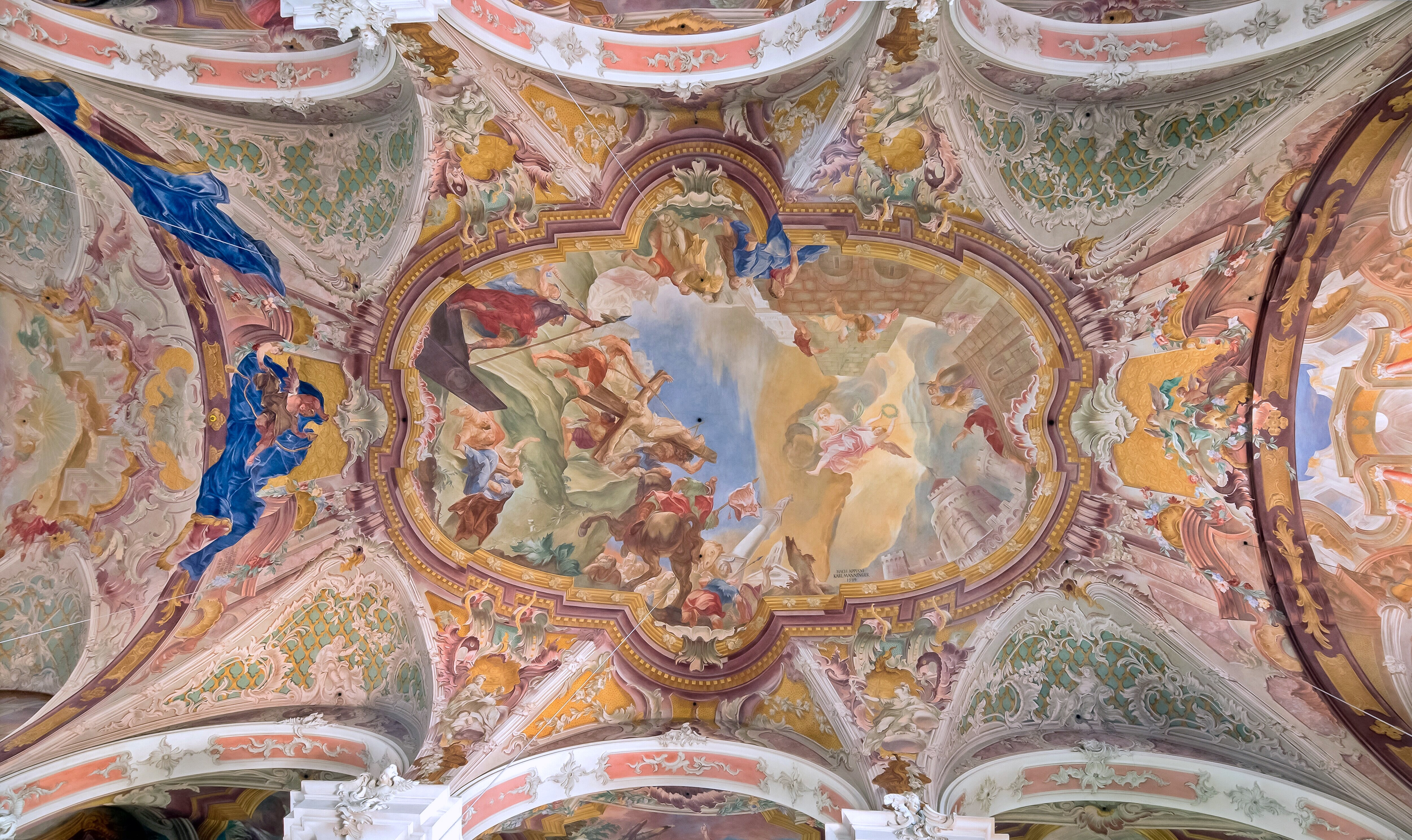 Die Kreuzigung des Apostels Petrus (mit dem Kopf nach unten). Rekonstruierte Fassung von Karl Manninger nach dem Vorbild des im Zweiten Weltkrieg zerstörten Originals des Mainzer Hofmalers Joseph Ignaz Appiani.